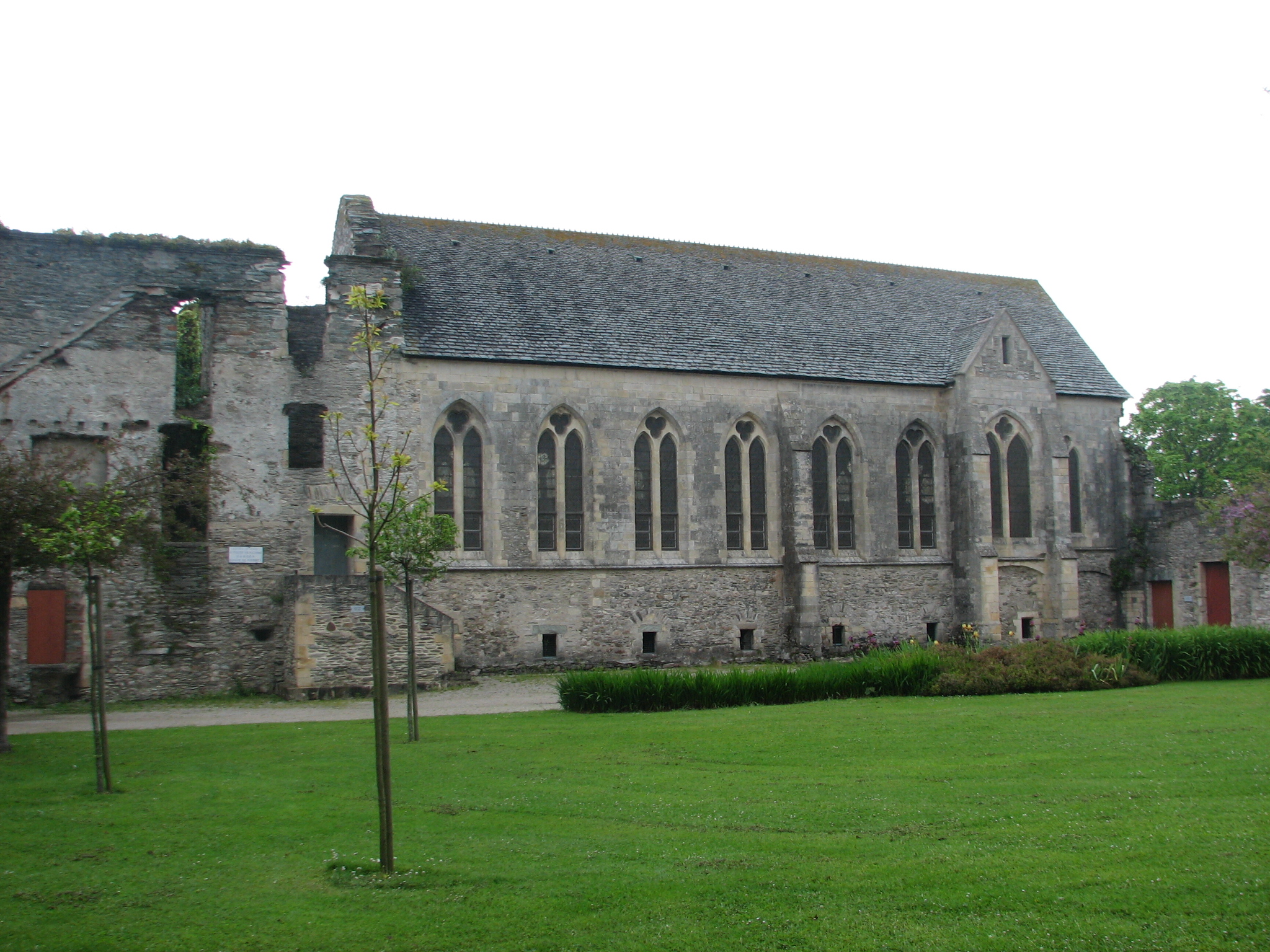 Réfectoire de l'Abbaye ND du Voeu à Cherbourg